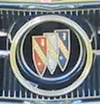 L'emblème utilisée par la marque Buick sur les modèles de 1960 à aujourd'hui. Celle-ci provient de la calandre du modèle Wildcat 1965.